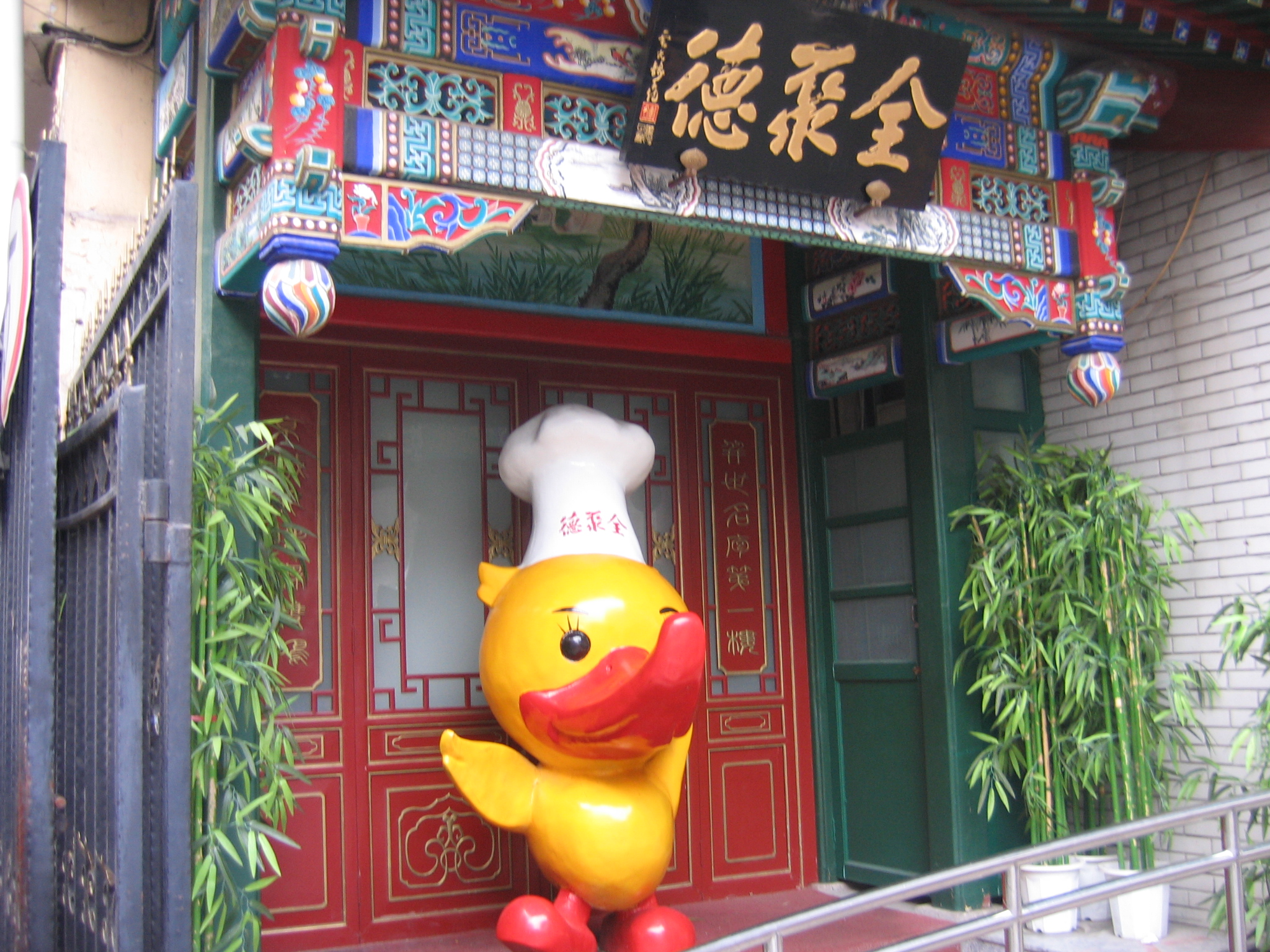 全聚德北京前门总店门口的吉祥物